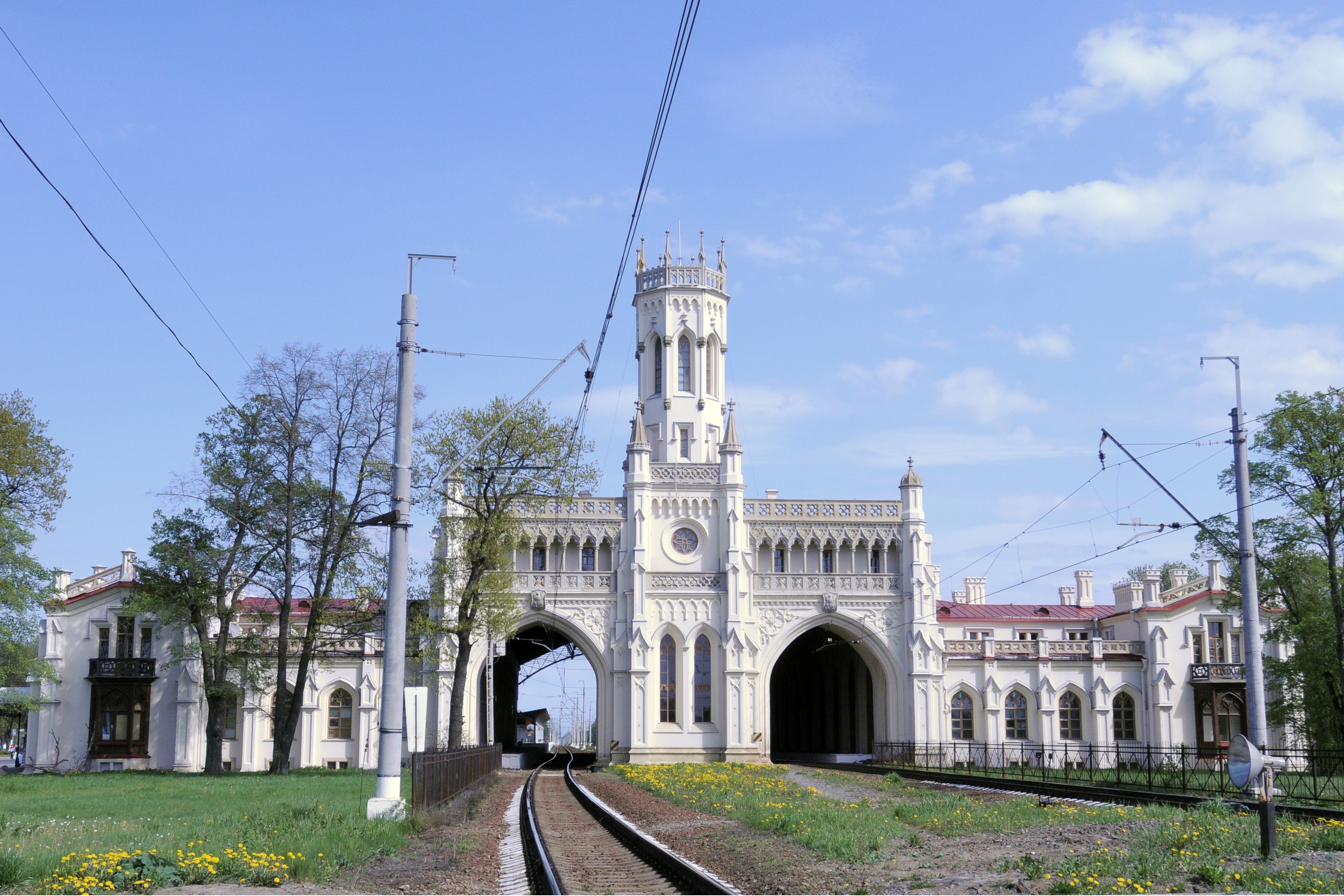 Станция Новый Петергоф, 2011 год